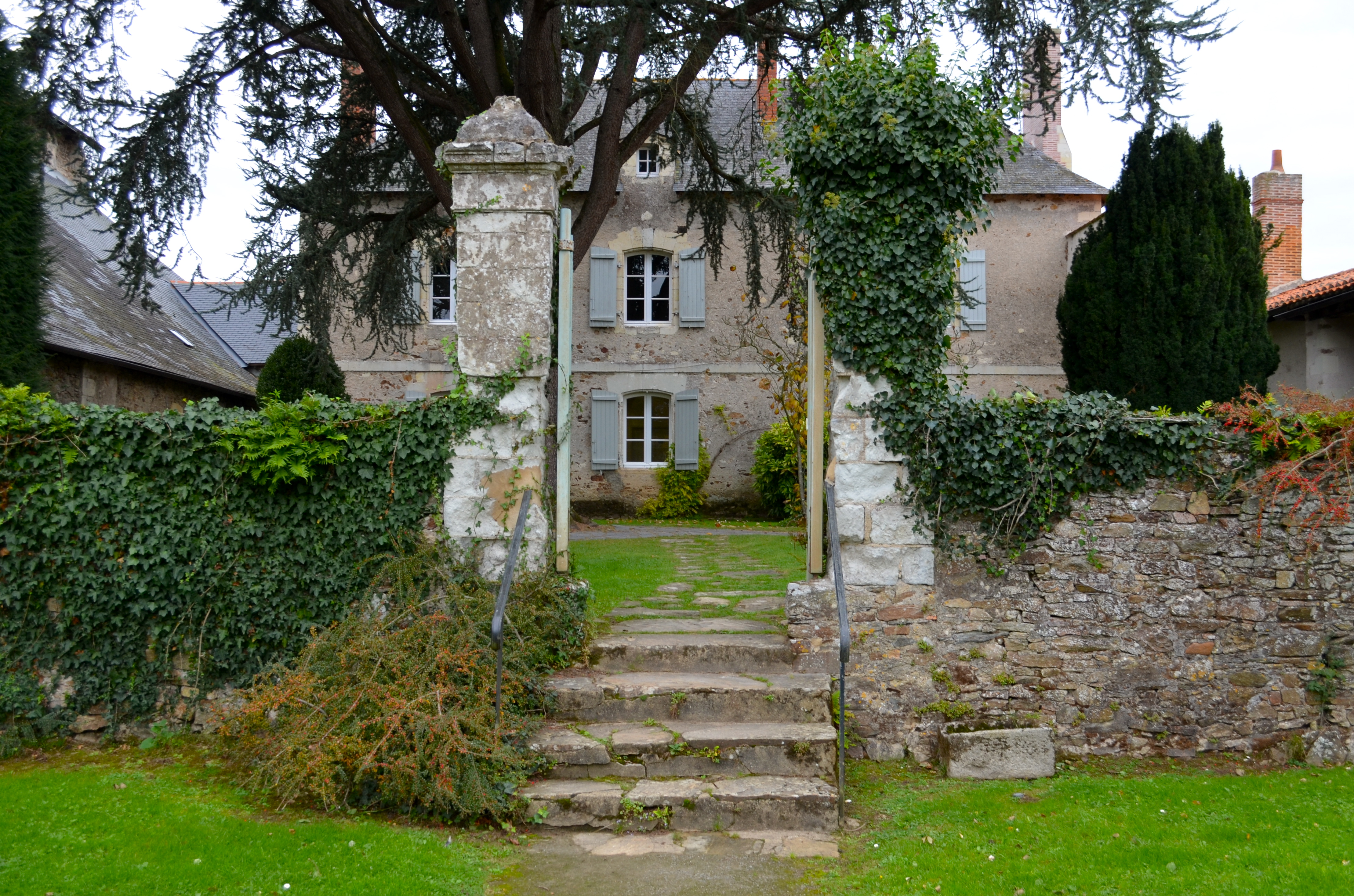 Abbatiale de Saint-Philbert-de-Grand-Lieu (Loire-Atlantique)